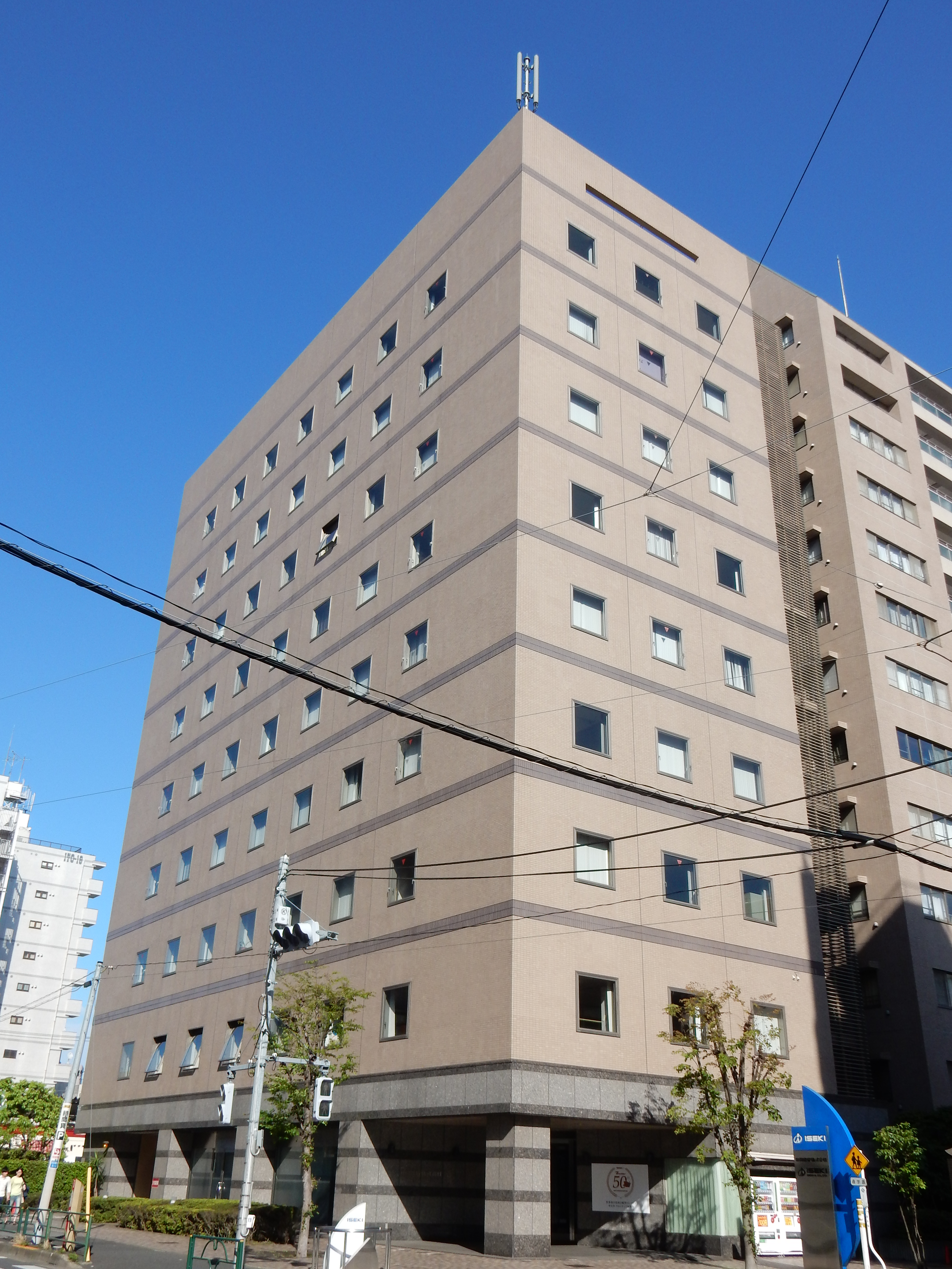 FSビル。井関農機が本社を置く。東京都荒川区西日暮里5丁目3番14号